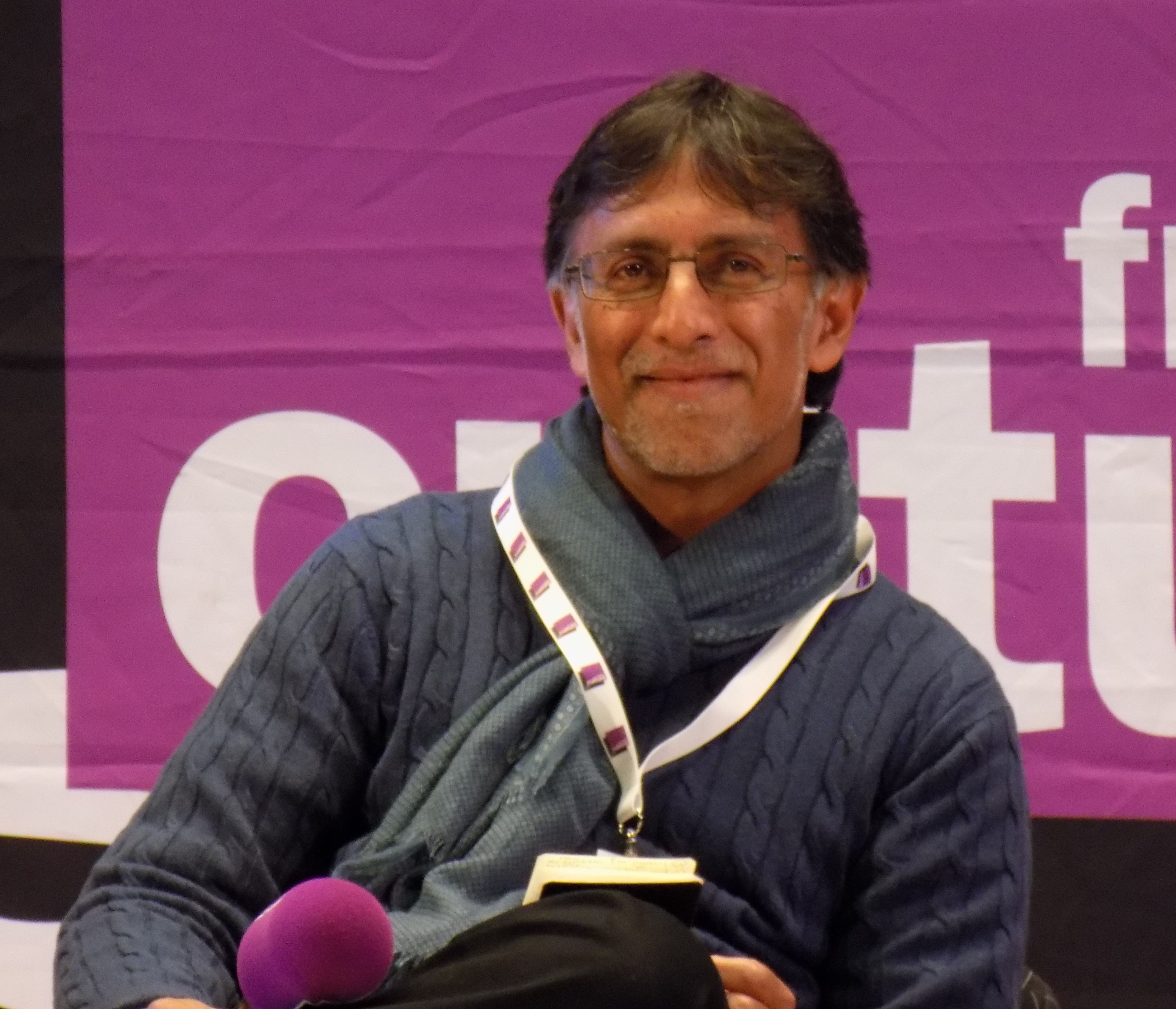 Sudhir Hazareesingh lors du forum « L’année vue par l’histoire » organisé par France Culture le 25 mars 2017